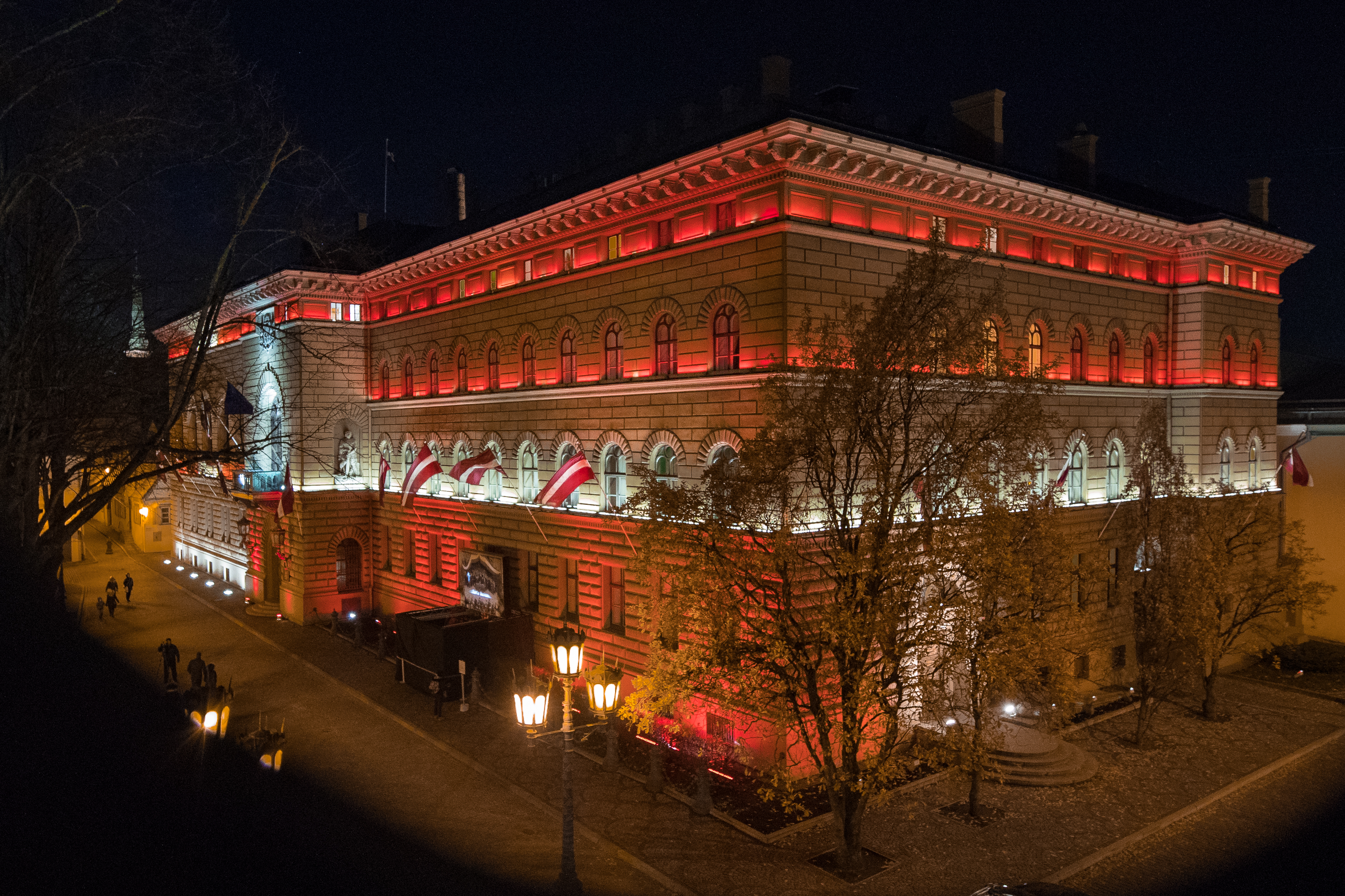 2018.gada 16.novembris. Svinot Latvijas valsts simtgadi, Saeima festivāla “Staro Rīga” ietvaros aicina apmeklēt gaismas objektu “Pie Latvijas šūpuļa”, lai godinātu Latvijas valsts dibinātājus. Gaismas objekta “Pie Latvijas šūpuļa” centrā ir vienīgā vizuālā valsts proklamēšanas liecība – Viļa Rīdzenieka fotogrāfija “Latvijas Republikas proklamēšana 1918.gada 18.novembrī Rīgā” -, kas laika gaitā kļuvusi par mūsu valsts dibināšanas simbolu. Foto: Ernests Dinka, Saeima Izmantošanas noteikumi: saeima.lv/lv/autortiesibas